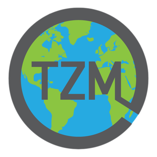 時代精神運動標誌